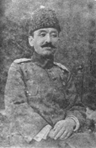 Battle of Sarıkamış The commander of X Corps Hafiz_Hakki